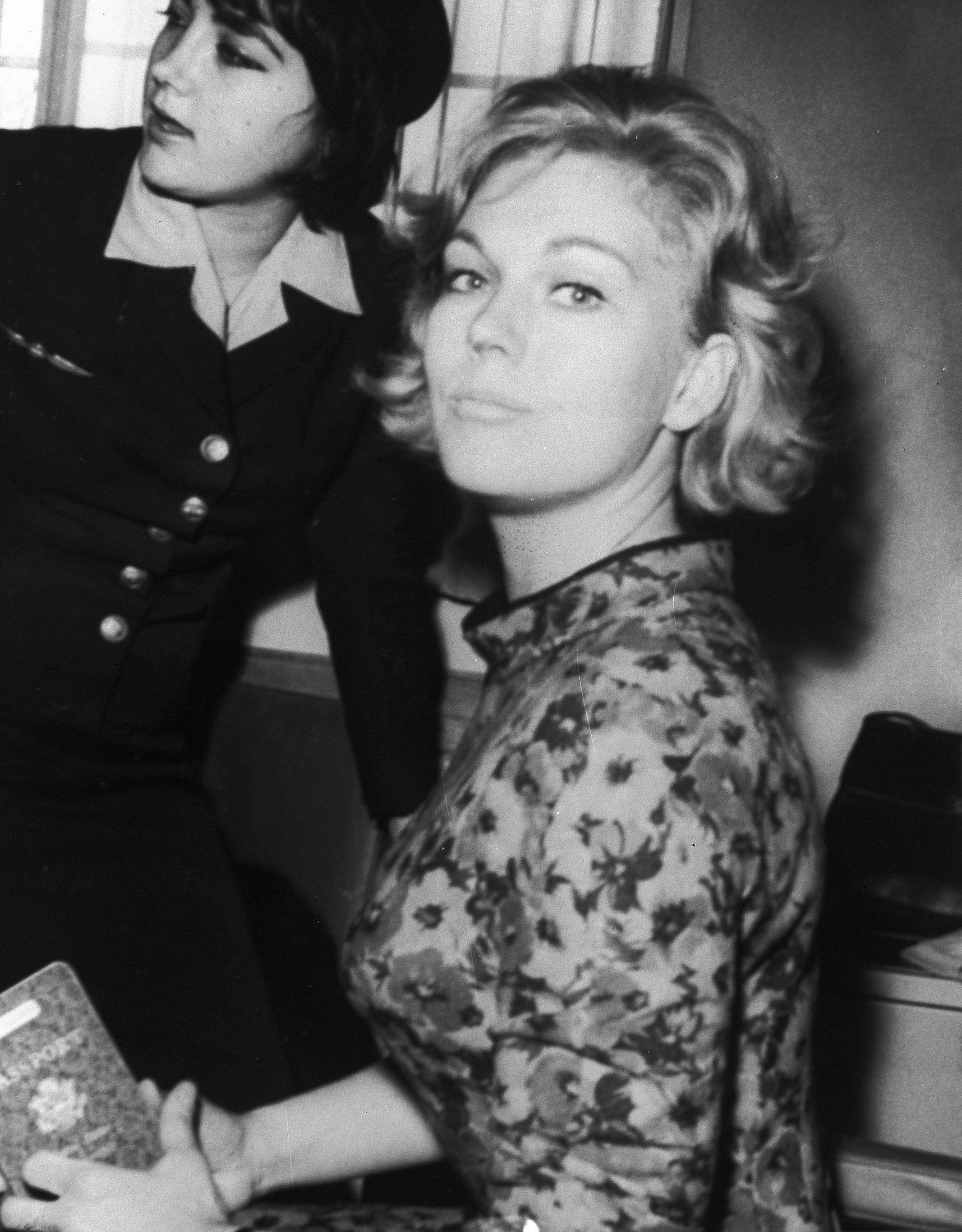 Kim Novak op vliegveld Madrid